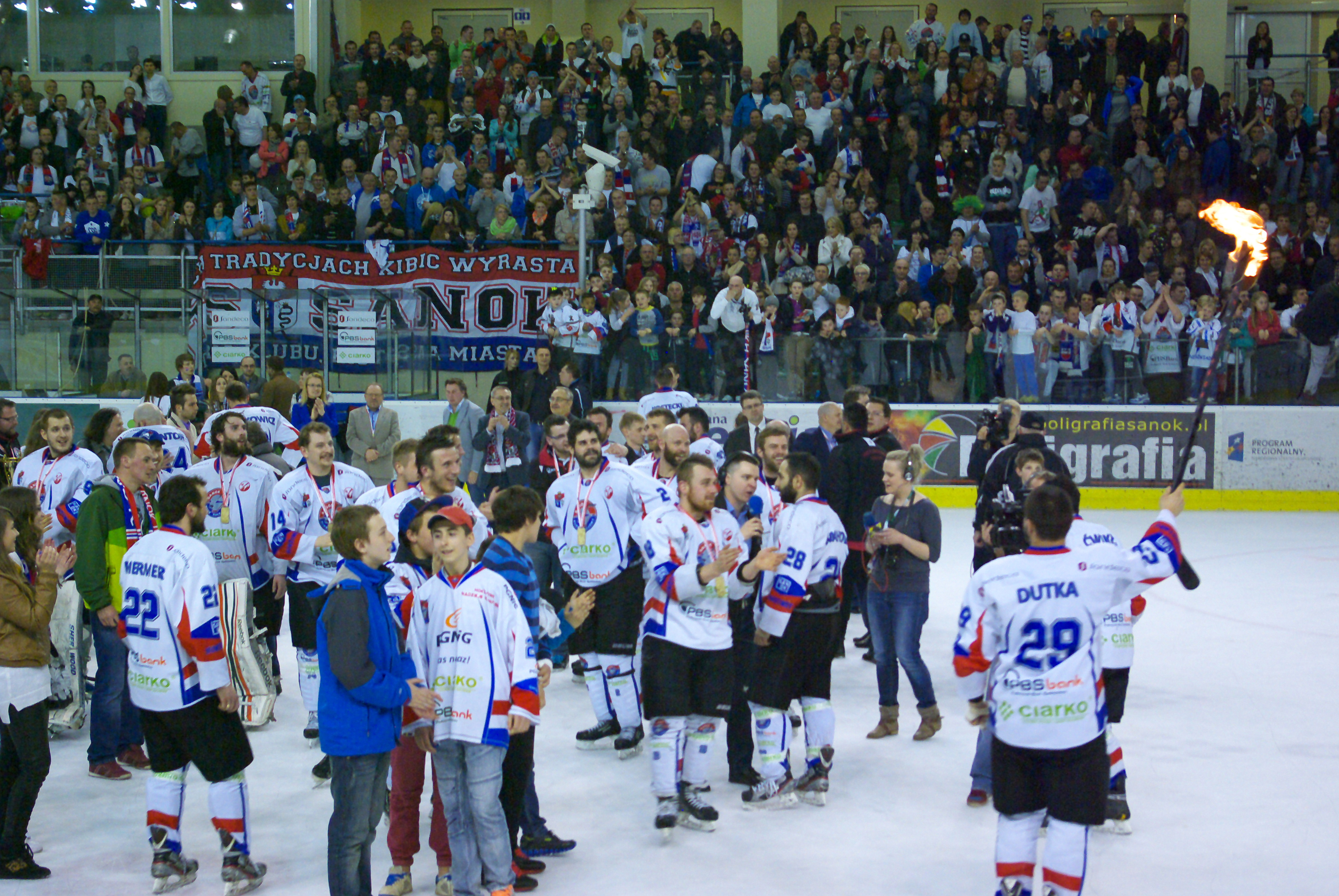 Szósty mecz finałowy o mistrzostwo Polski w hokeju na lodzie w sezonie PHL 2013/2014: Ciarko PBS Bank KH Sanok – GKS Tychy (2:0), 3 kwietnia 2014 w Sanoku (Arena Sanok). Złoty medal dla zespołu z Sanoka.